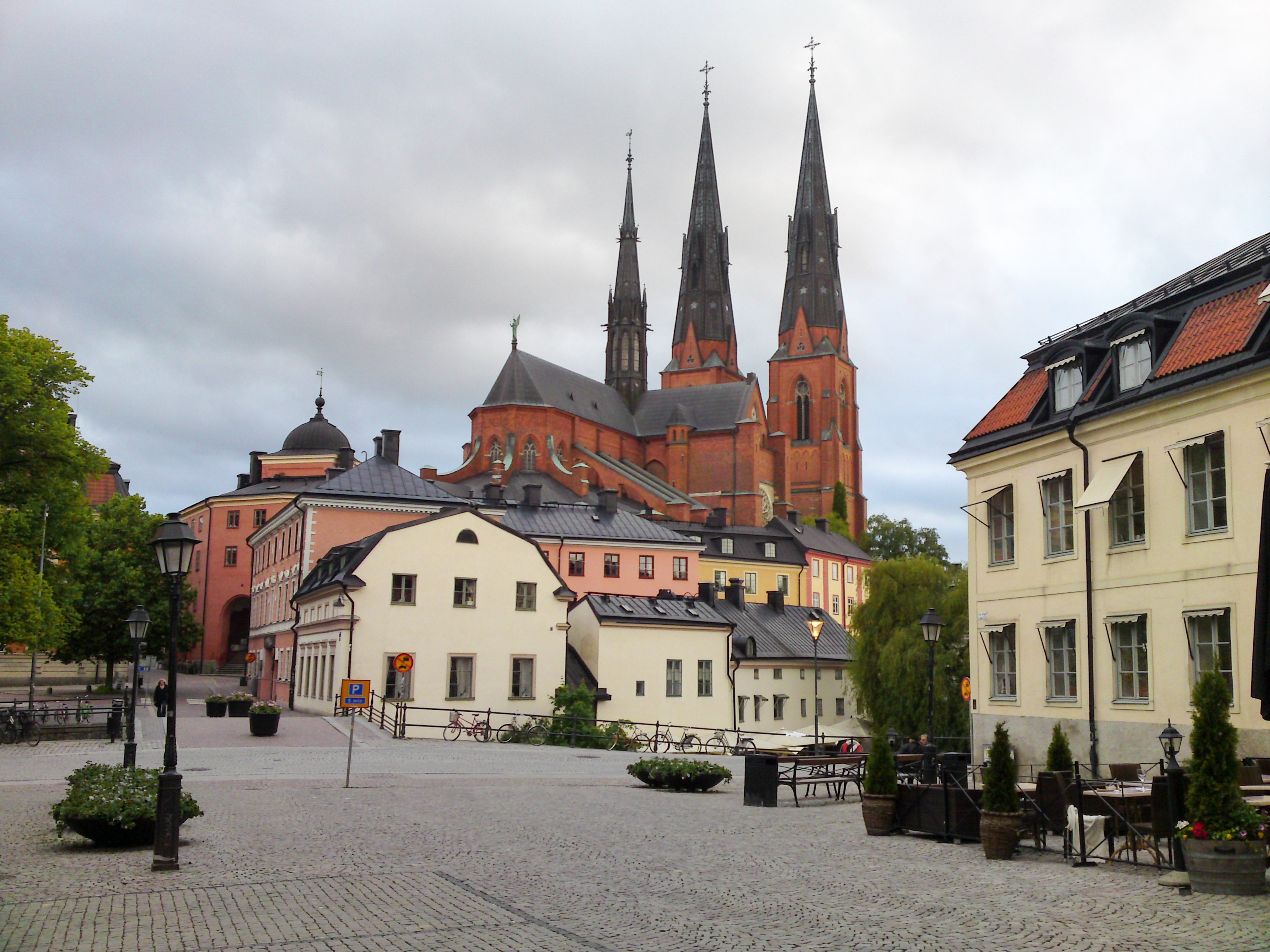 Uppsala_domkyrka,_Domtrapphuset, med mera.